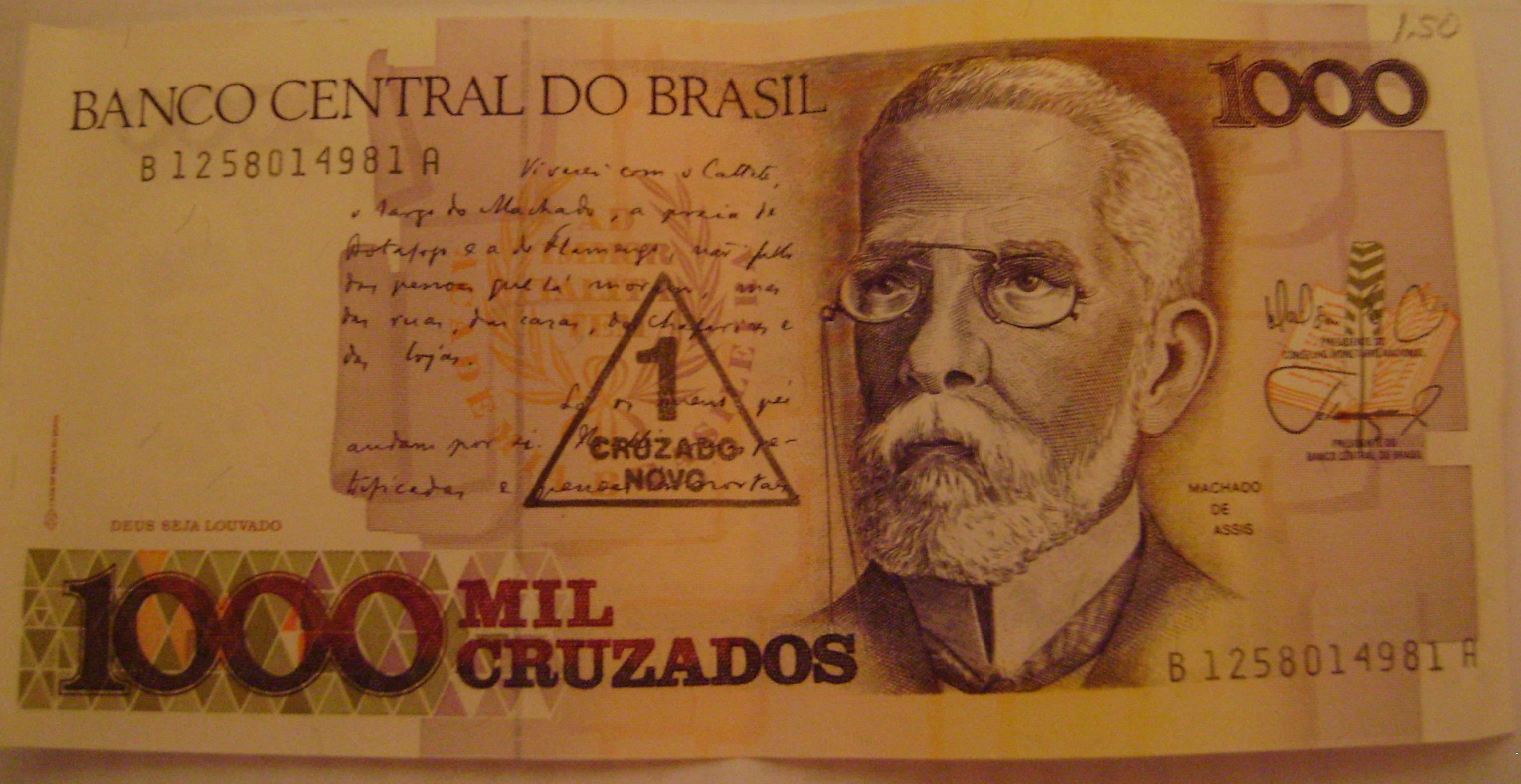 Billete brasileño en el que aparece el escritor Machado de Assis.